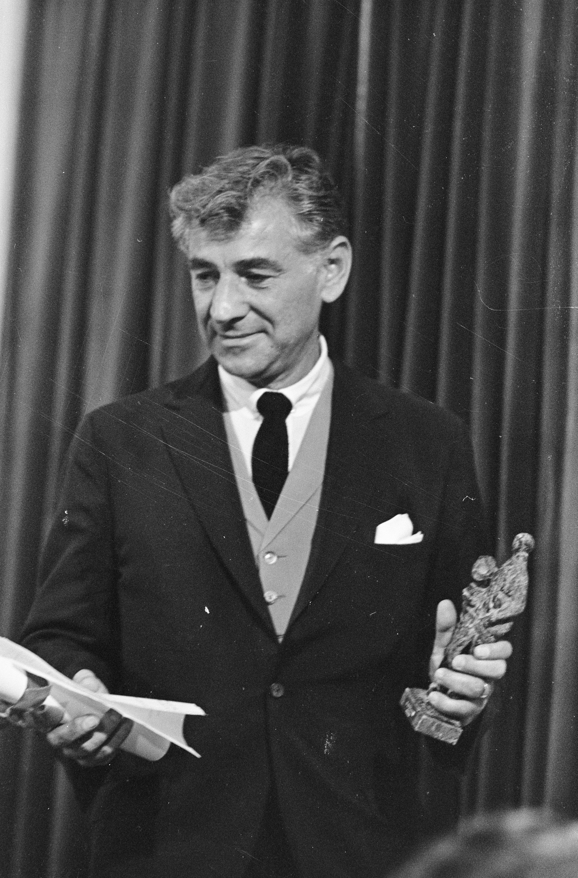 Collectie / Archief : Fotocollectie Anefo Reportage / Serie : Leonard Bernstein ontvangt de Edison klassiek Beschrijving : Leonard Bernstein in een ontspannen pose Datum : 20 september 1968 Locatie : Amsterdam, Noord-Holland Trefwoorden : musici, portretten Persoonsnaam : BERNSTEIN LEONARD Fotograaf : Fotograaf Onbekend / Anefo Auteursrechthebbende : Nationaal Archief Materiaalsoort : Negatief (zwart/wit) Nummer archiefinventaris : bekijk toegang 2.24.01.05 Bestanddeelnummer : 921-6976